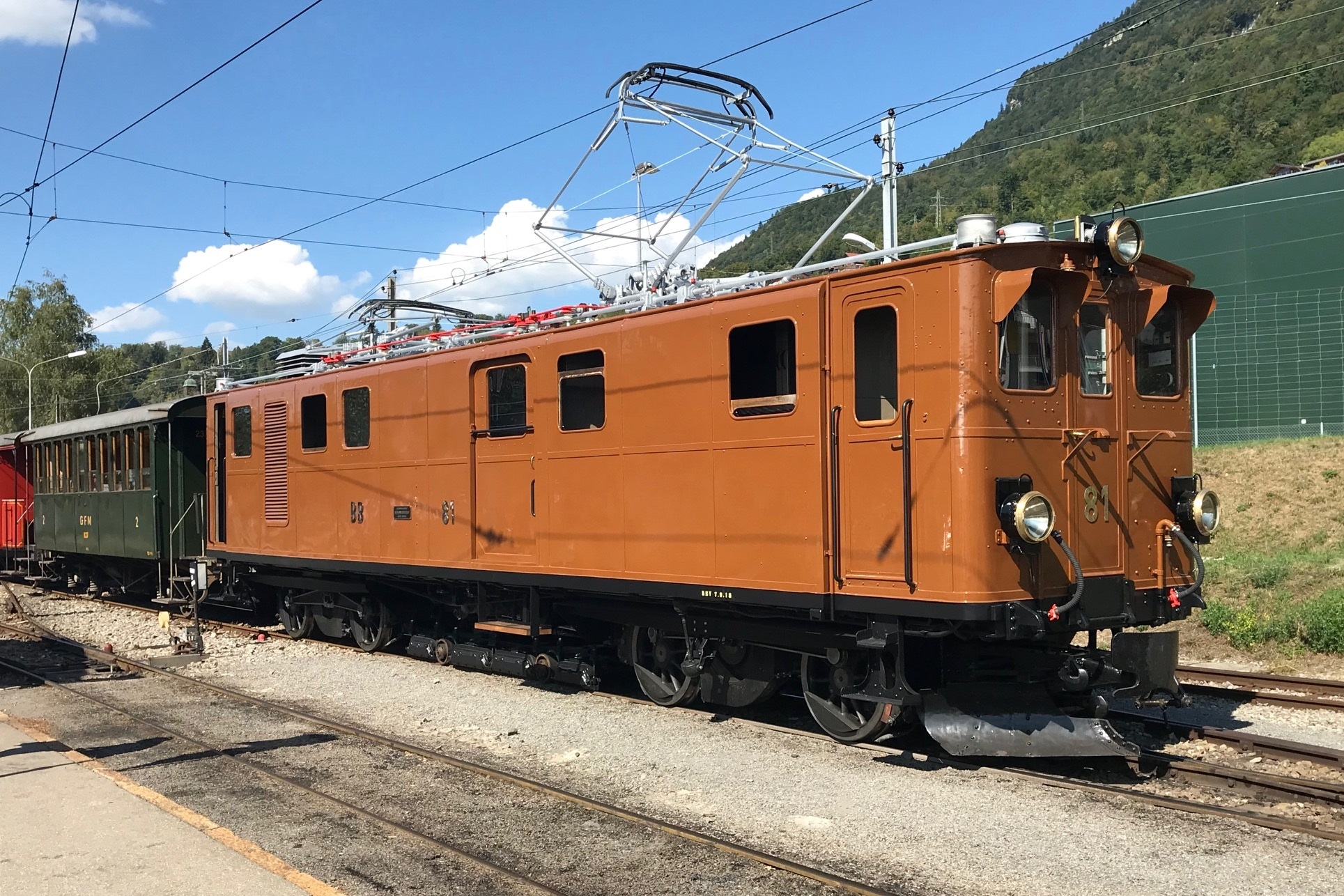 Die sich seit 1970 im Besitz der Museumsbahn Blonay-Chamby (BC) befindende Ge 4/4 81 der ehemaligen Berninabahn (BB) frisch refidiert in Blonay. Die Elektrolokomotive ist wieder mit der ursprünglich mit der Nummer 81 versehen. Zwischen 1961 und 2018 war sie mit der Nummer 181 bezeichnet. Abgeliefert wurde die Lokomotive 1916 als Ge 6/6. In eine Ge 4/4 umgebaut wurde die Lokomotive 1929. Mit der Fusion der Berninabahn und der Rhätischen Bahn (RhB) 1943 gehörte die Lokomotive über länger Zeit der Rhätischen Bahn.